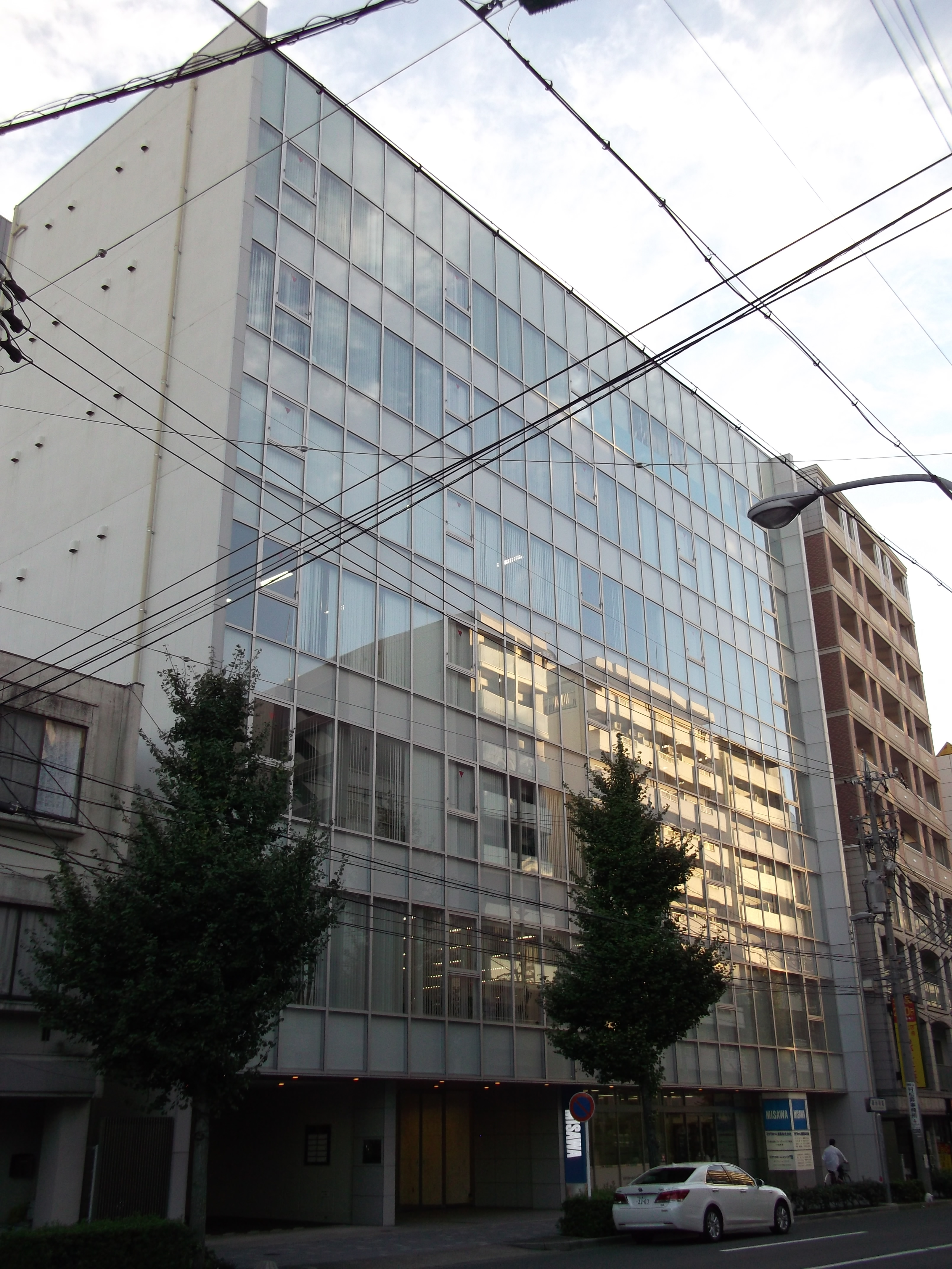 名古屋市中区新栄二丁目のグランスクエア新栄を北東側公道東側より撮影